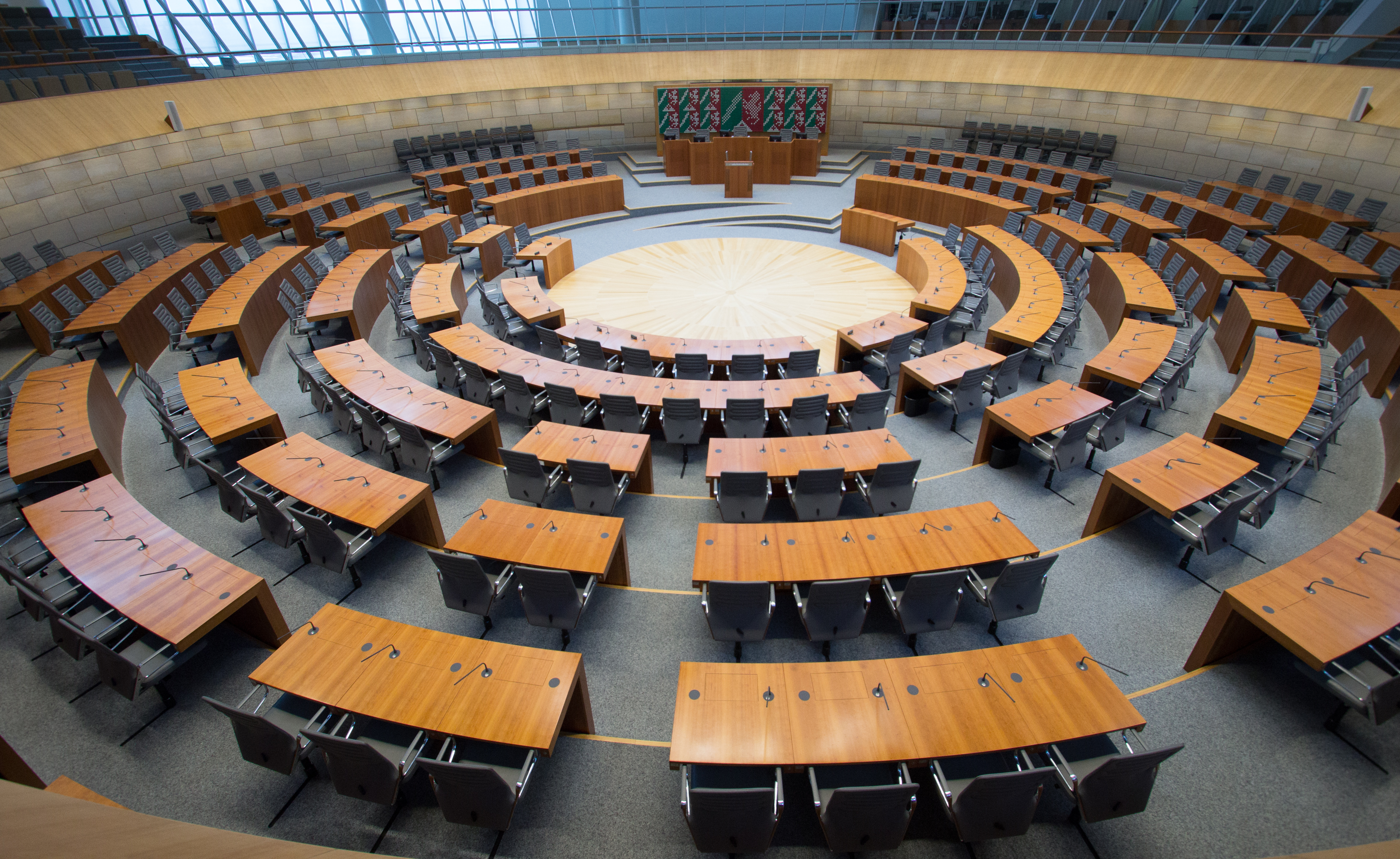 Plenarsaal im Landtag Nordrhein-Westfalen am 2.November 2017